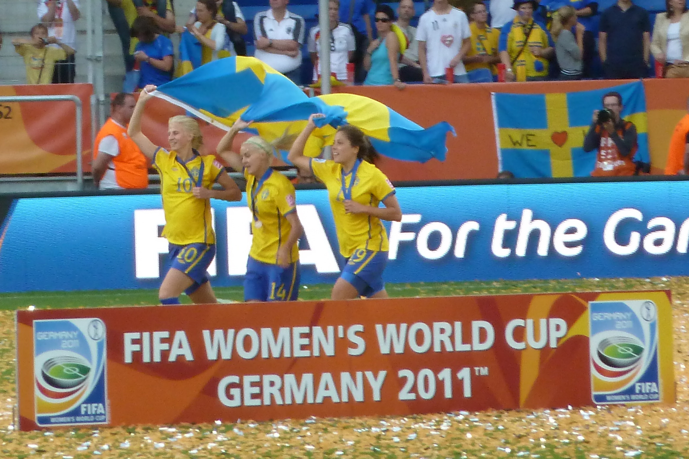 Die schwedische Nationalmannschaft der Frauen feiert den Gewinn von Platz 3 gegen Frankreich: Sofia Jakobsson, Josefine Öqvist und Madelaine Edlund